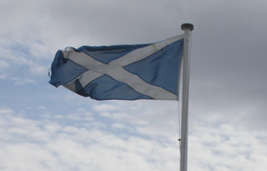 Tattered Saltire